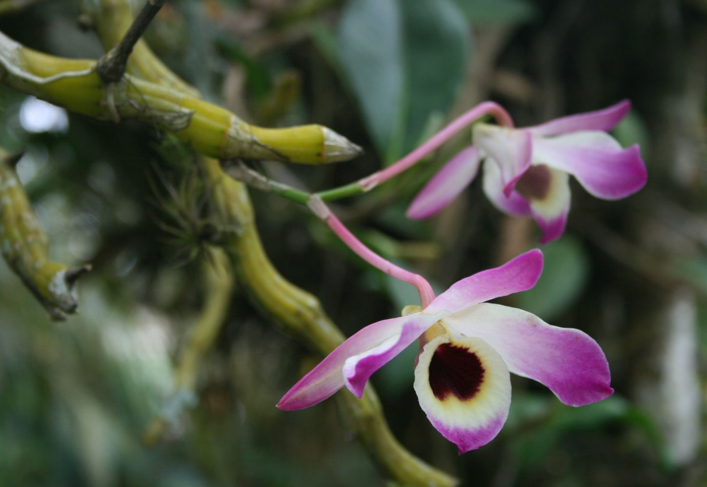 Dendrobium nobile, Orchideen (Orchidaceae) - Costa Rica: Prov. Cartago, Paraíso, Jardín Botánico Lankester/Lankester Botanical Garden